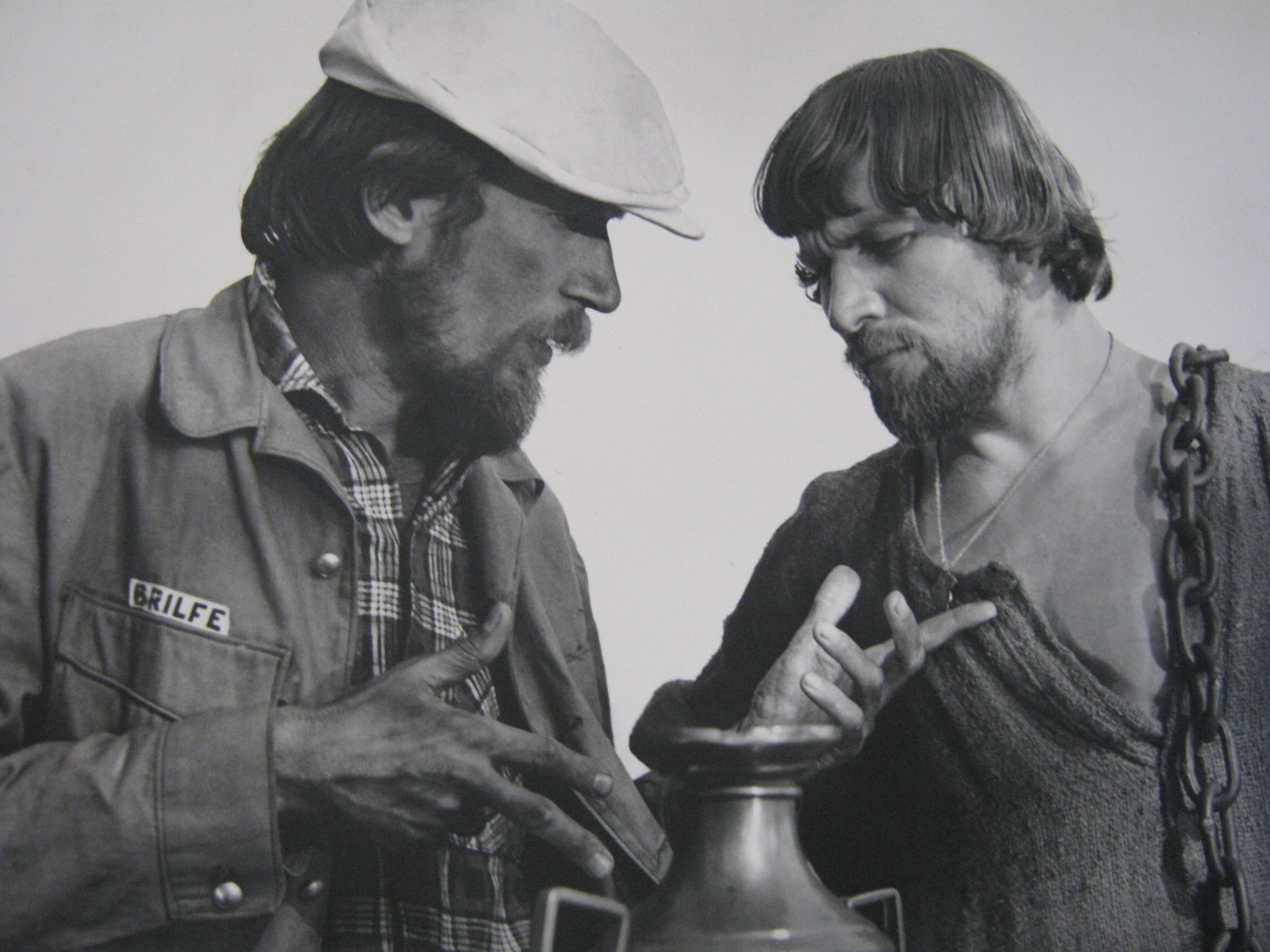 На съёмках фильма «Степанова памятка» автор сценария, режиссер-постановщик Ершов Константин Владимирович и актер Егоров Геннадий Семёнович